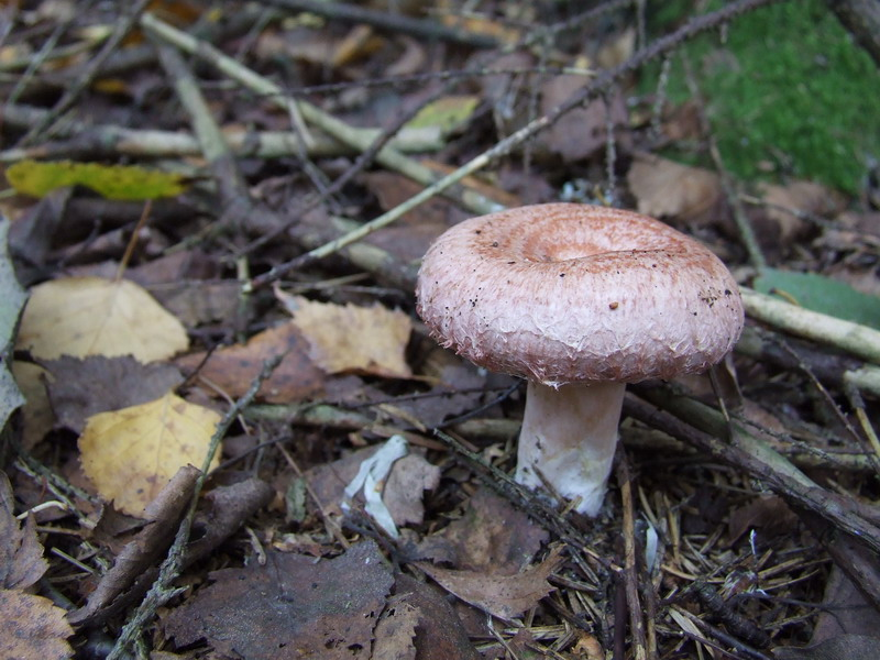 Lactarius torminosus. Karmėlava forest, Lithuania.